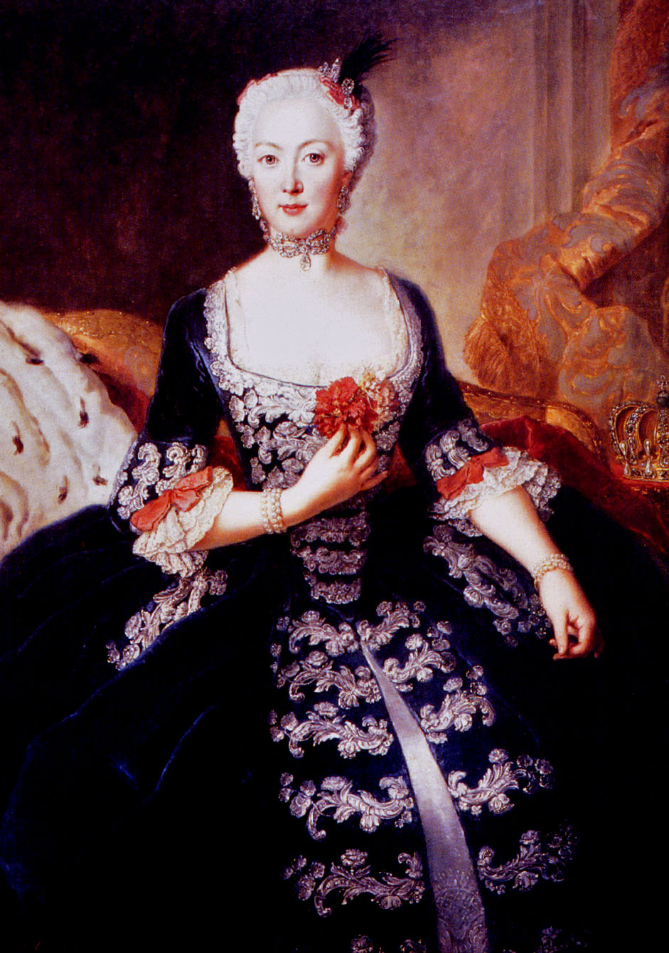 Portrait of Elisabeth Christine von Braunschweig-Bevern (1715-1797)